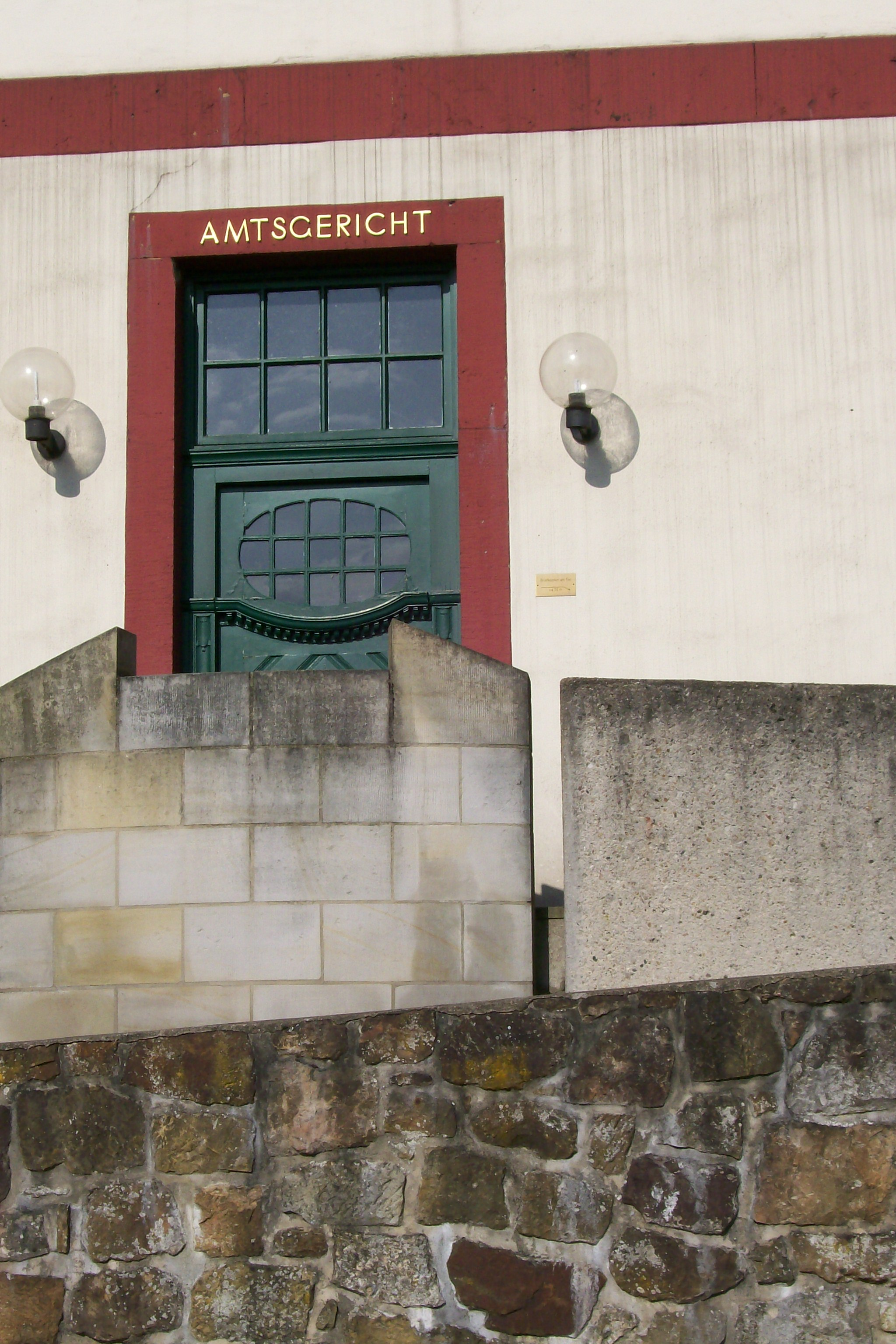 Amtsgericht Bad Iburg, Eingang. Das Gericht hat seinen Sitz im Schloss Bad Iburg